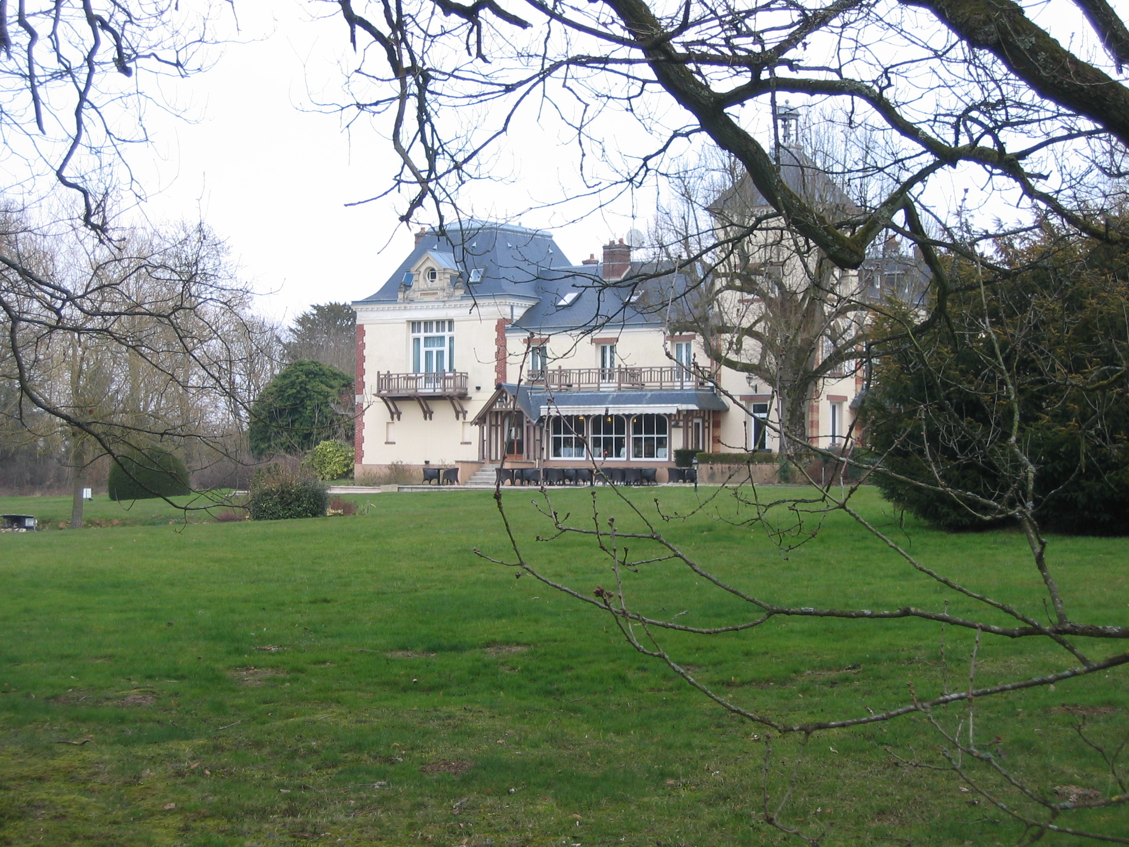 Vue de l'hôtel des Bondons à La Ferté-sous-Jouarre, Seine-et-Marne, France en mars 2013